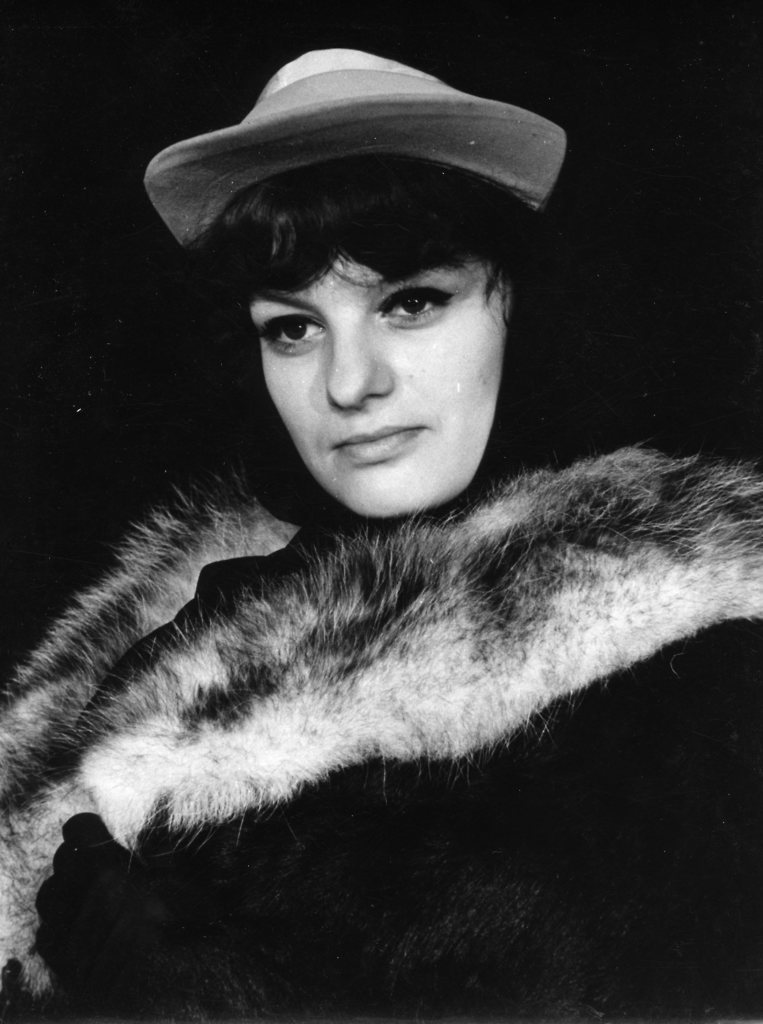 Arthur Schnitzler, Božični nakupi, UL AGRFT. Na fotografiji: Ljerka Belak (Gabriele) v Božičnih nakupih Arthurja .